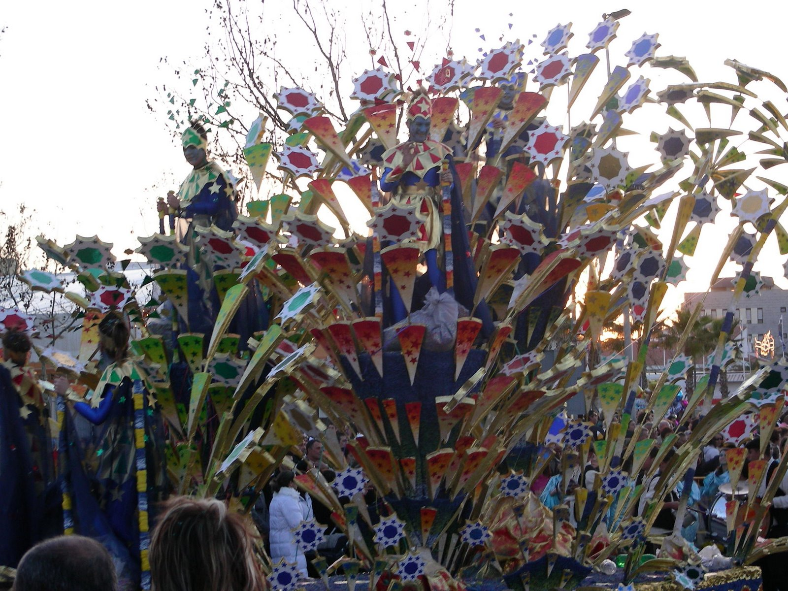 Cabalgata durante el domingo de Carnaval en Isla Cristina